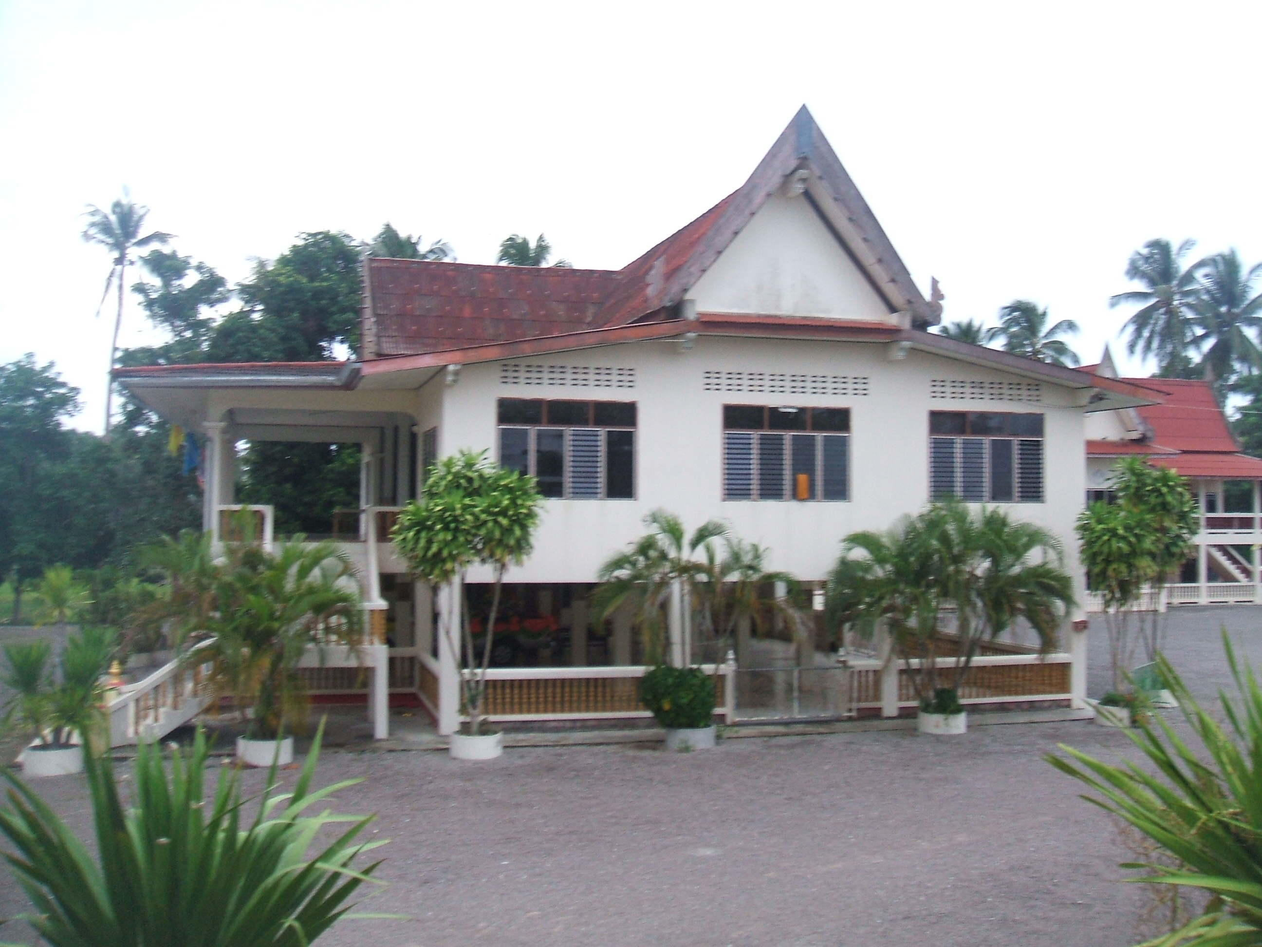 ศาลาการเปรียญ วัดหนองมงคล